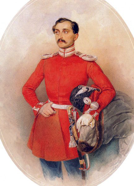 Давид Багратович Грузинский (1819—1888)